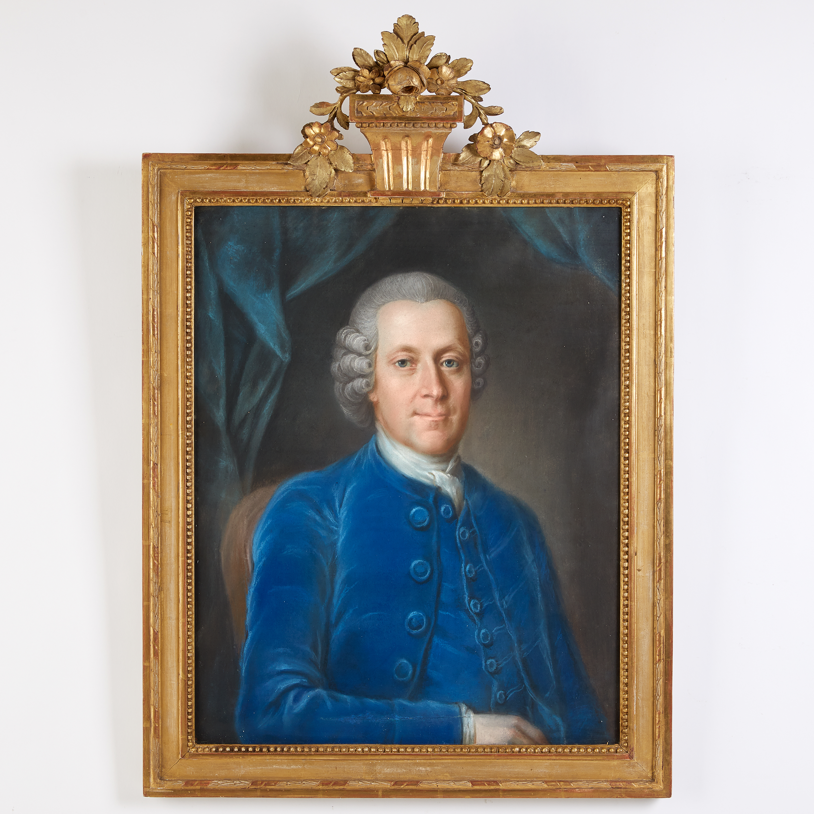 Porträtt av kommerserådet Lorentz Görges (1723-1803) iklädd blå dräkt. Avporträtterad troligen under 1770-talet av Jonas Forsslund.